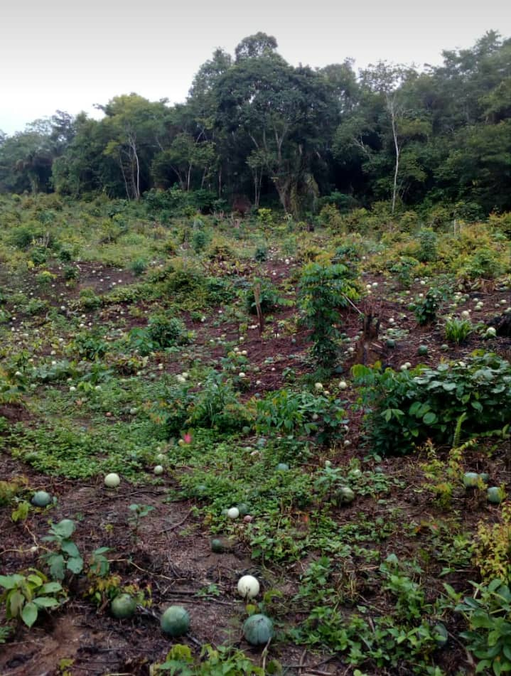 Champ de pastèques, Sangmélima, Sud Cameroun